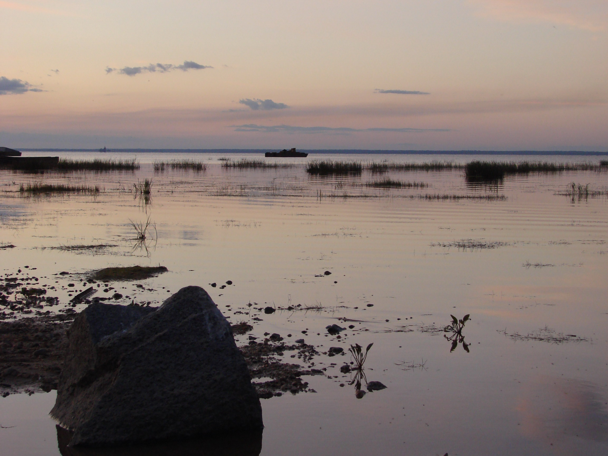 Кубенское озеро